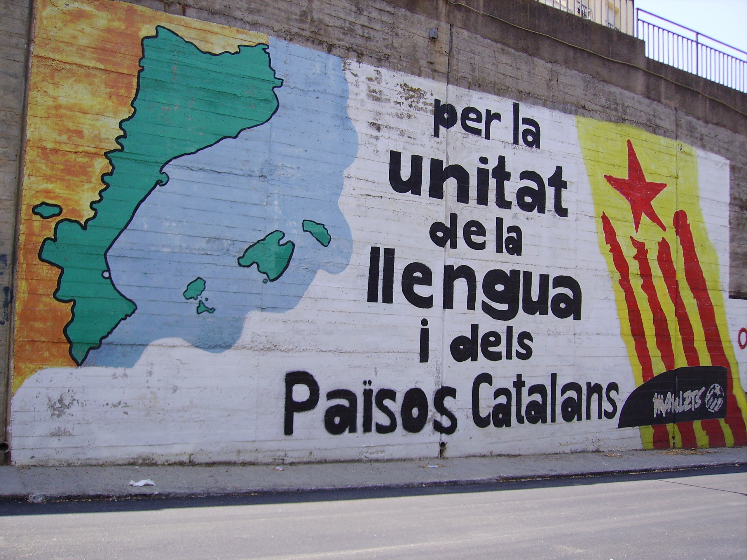 Mural a Argentona, El Maresme, Catalunya.